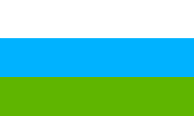 Bandera del cantón de Talamanca, Costa Rica.